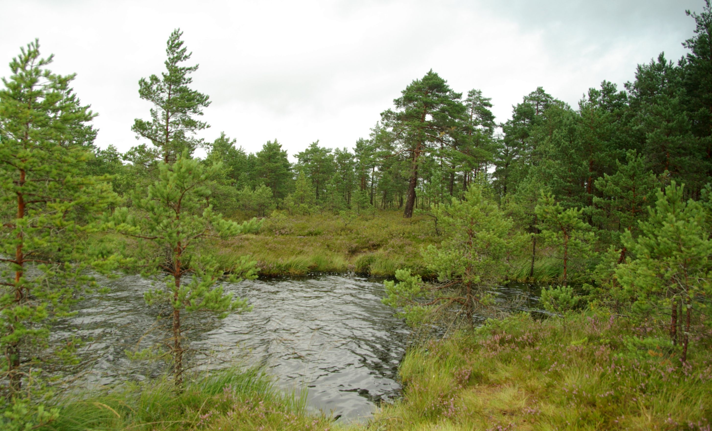 Ördi raba (ka Öördi raba) on soo Viljandi maakonna loodeosas Soomaa rahvuspargis. Öördi raba on tekkinud järve soostumisel, mille jäänukina on alles jäänud Öördi järv.